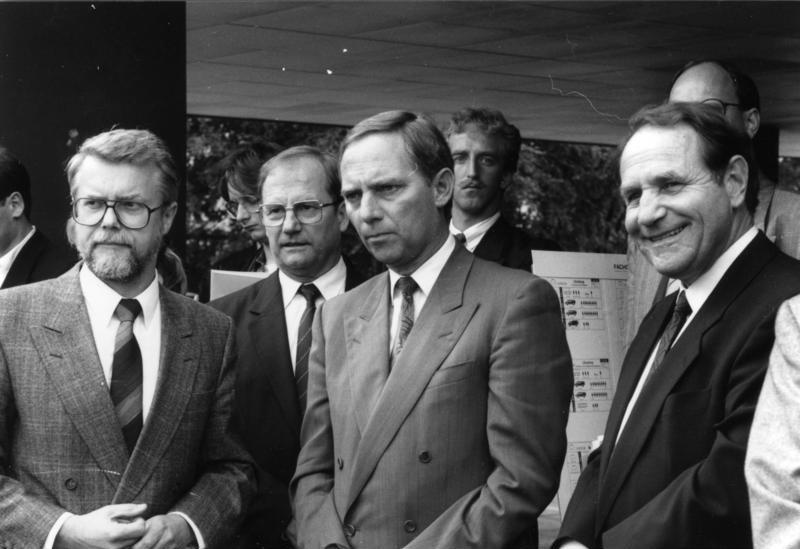 Bonn, Wolfgang Schäuble bei BZS 03.07.1989 Bonn BZS Besuch des Bundesministers des Innern Dr. Wolfgang Schäuble [Bonn.- Besuch von Innenminister Wolfgang Schäuble beim Bundesamt für Zivilschutz (BZS), rechts aussen Präsident des Bundesamtes für Zivilschutz, Hans Georg Dusch] Abgebildete Personen: Schäuble, Wolfgang Dr.: Bundesinnenminister, Fraktionsvorsitzender der CDU/CSU, Bundesrepublik Deutschland (GND 118814311) Dusch, Hans Georg: Amtsleiter des Bundesamtes für Zivilschutz, Bundesrepublik Deutschland# Information added by Wikimedia users.